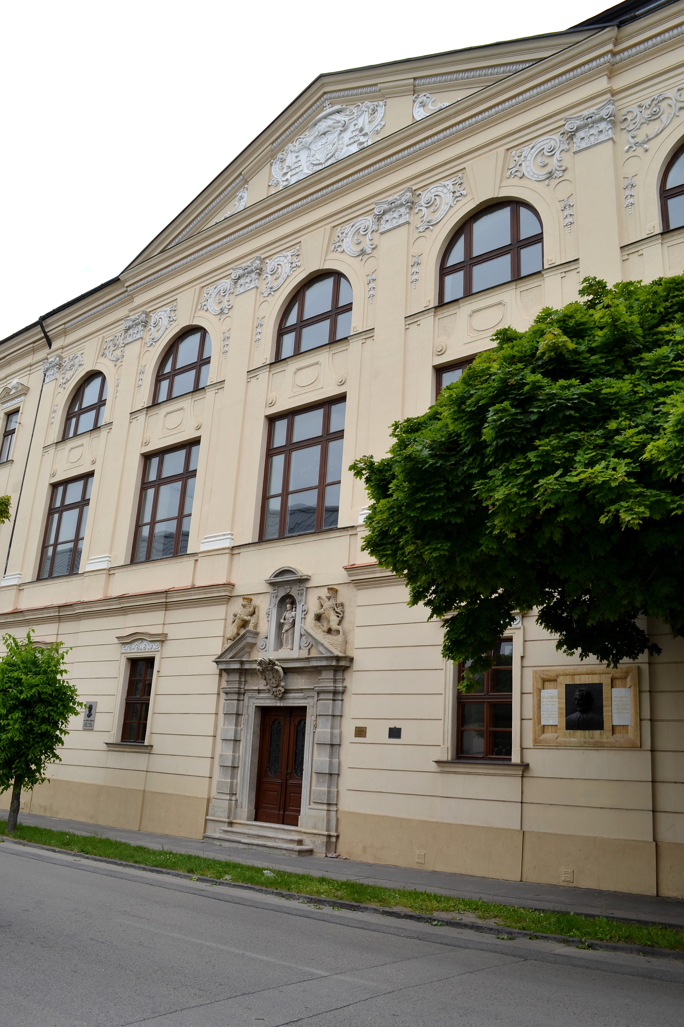 Trnava, komplex univerzitných budov; budova Mariánskeho seminára (Marianum)